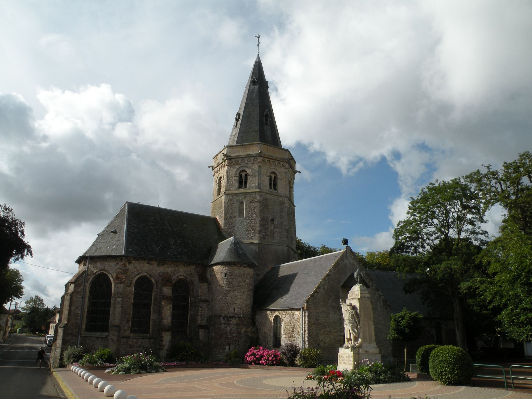 L'église de Marquise.